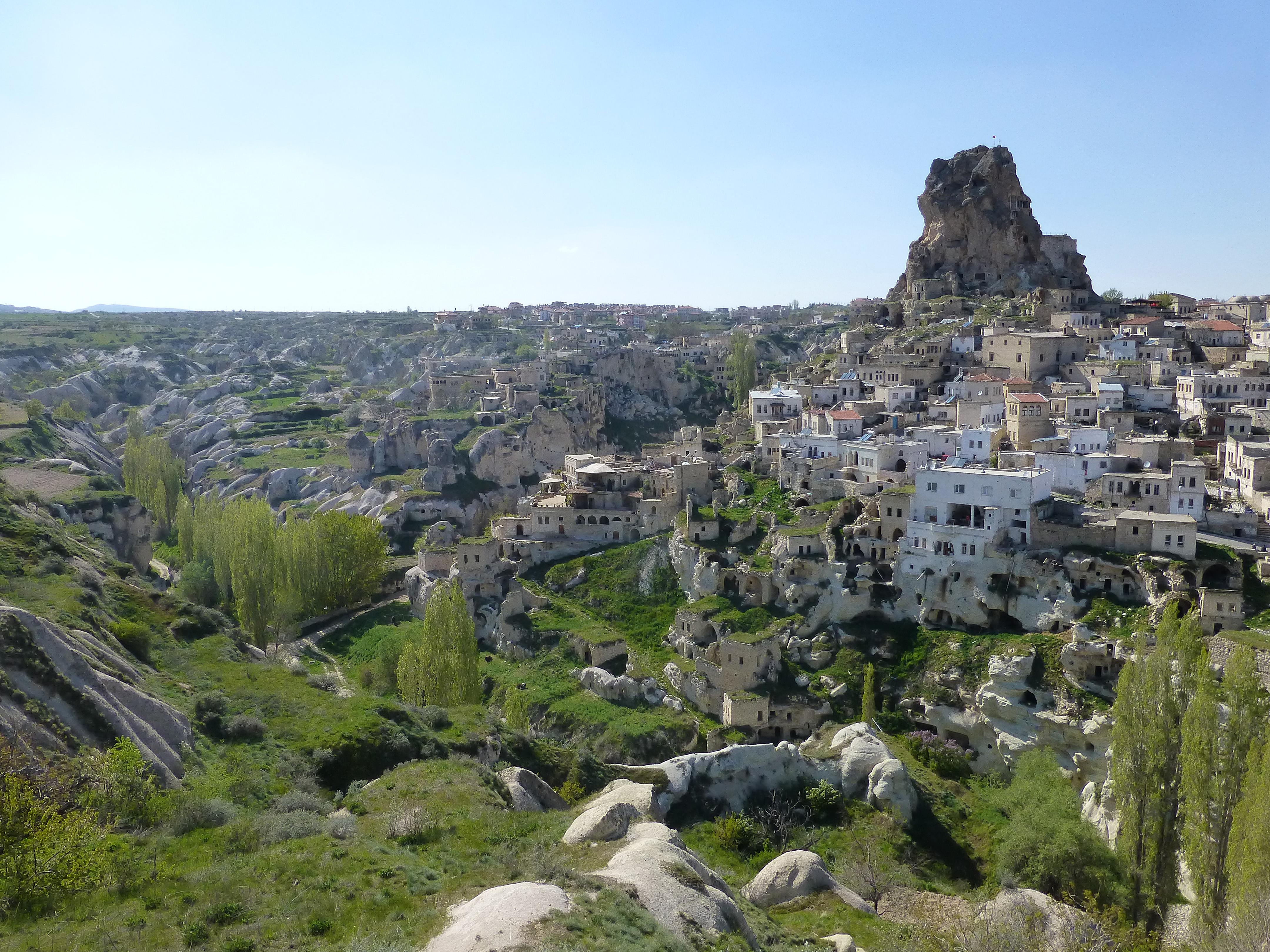 Vue sur Ortahisar (province de Nevşehir, Cappadoce, Turquie)